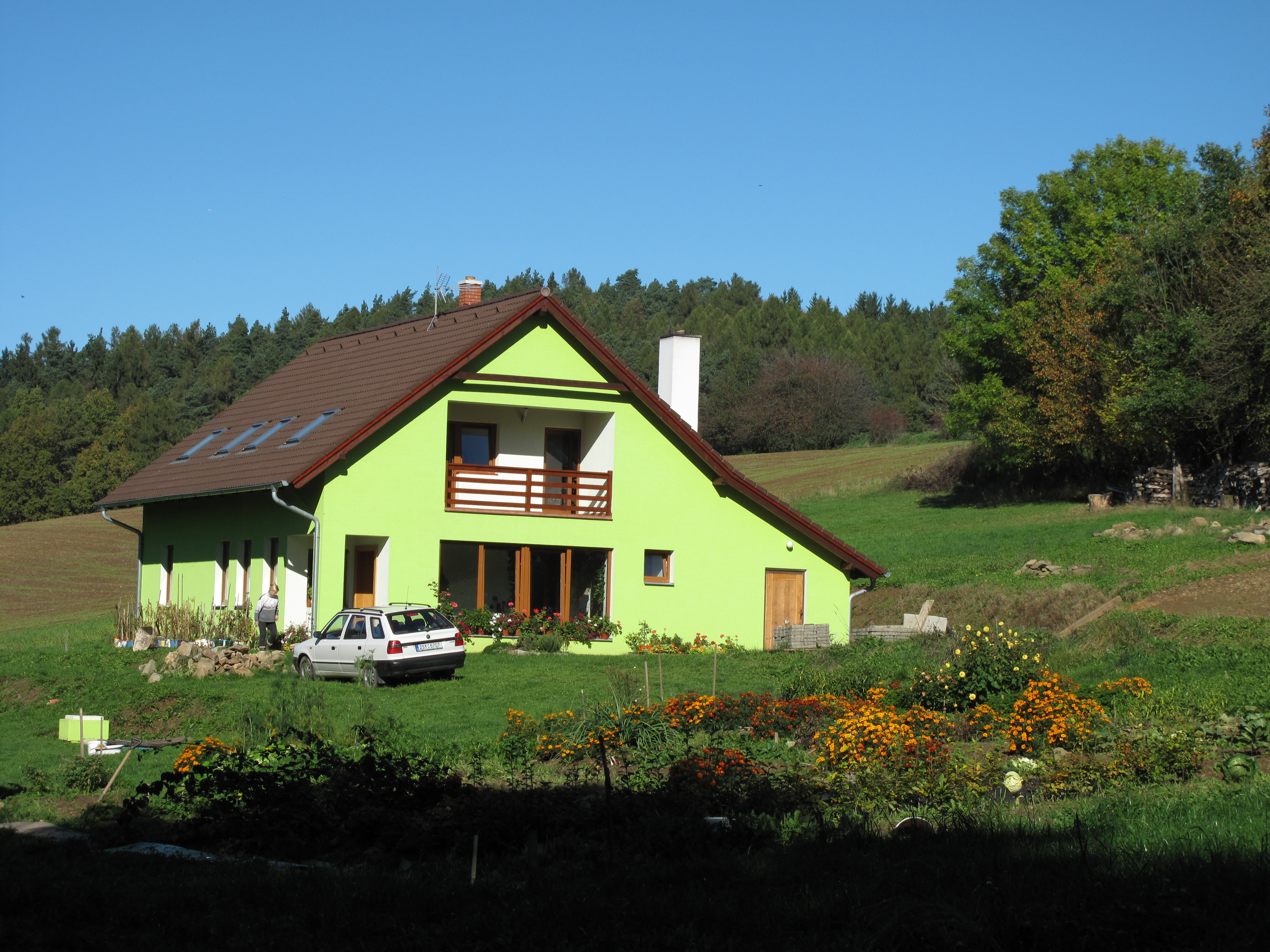 Nový dům v Oukřtalově. Okres Příbram, Česká republika.